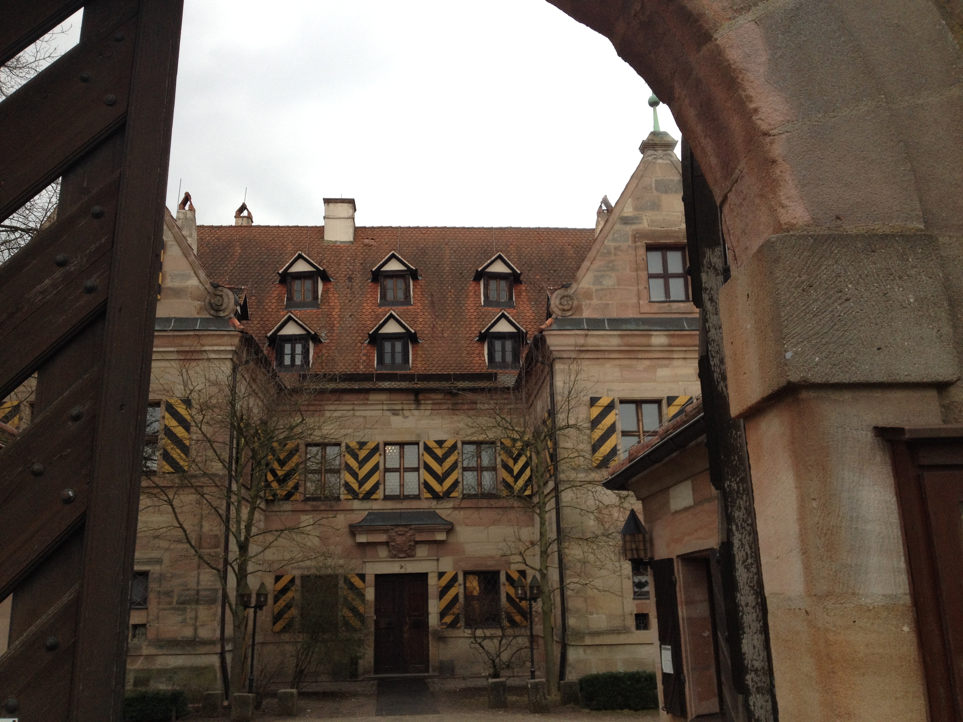 Holzschuher-Schlösschen in Almoshof, Stadt Nürnberg, Bayern, Deutschland